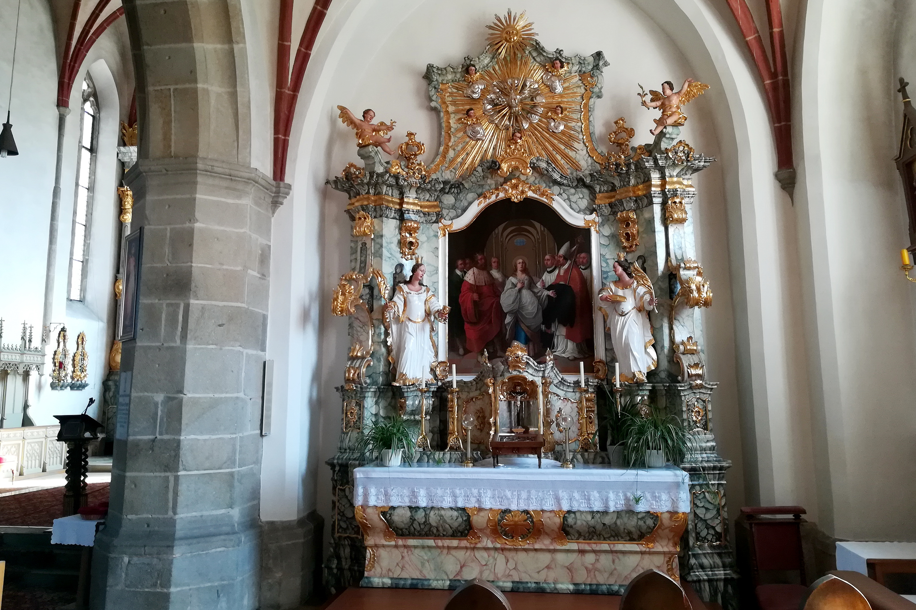 Die katholische Pfarrkirche Mariä Himmelfahrt ist ein denkmalgeschütztes Kirchengebäude in Chammünster.